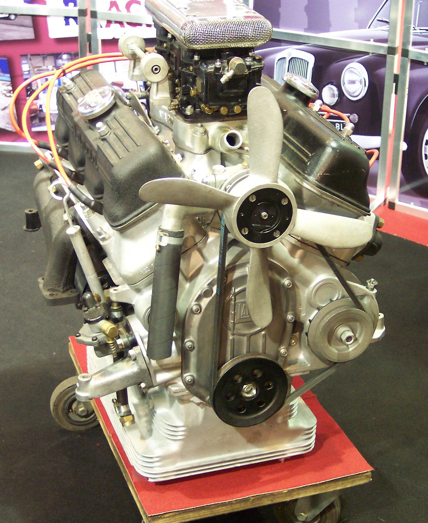 Lancia V6 engine